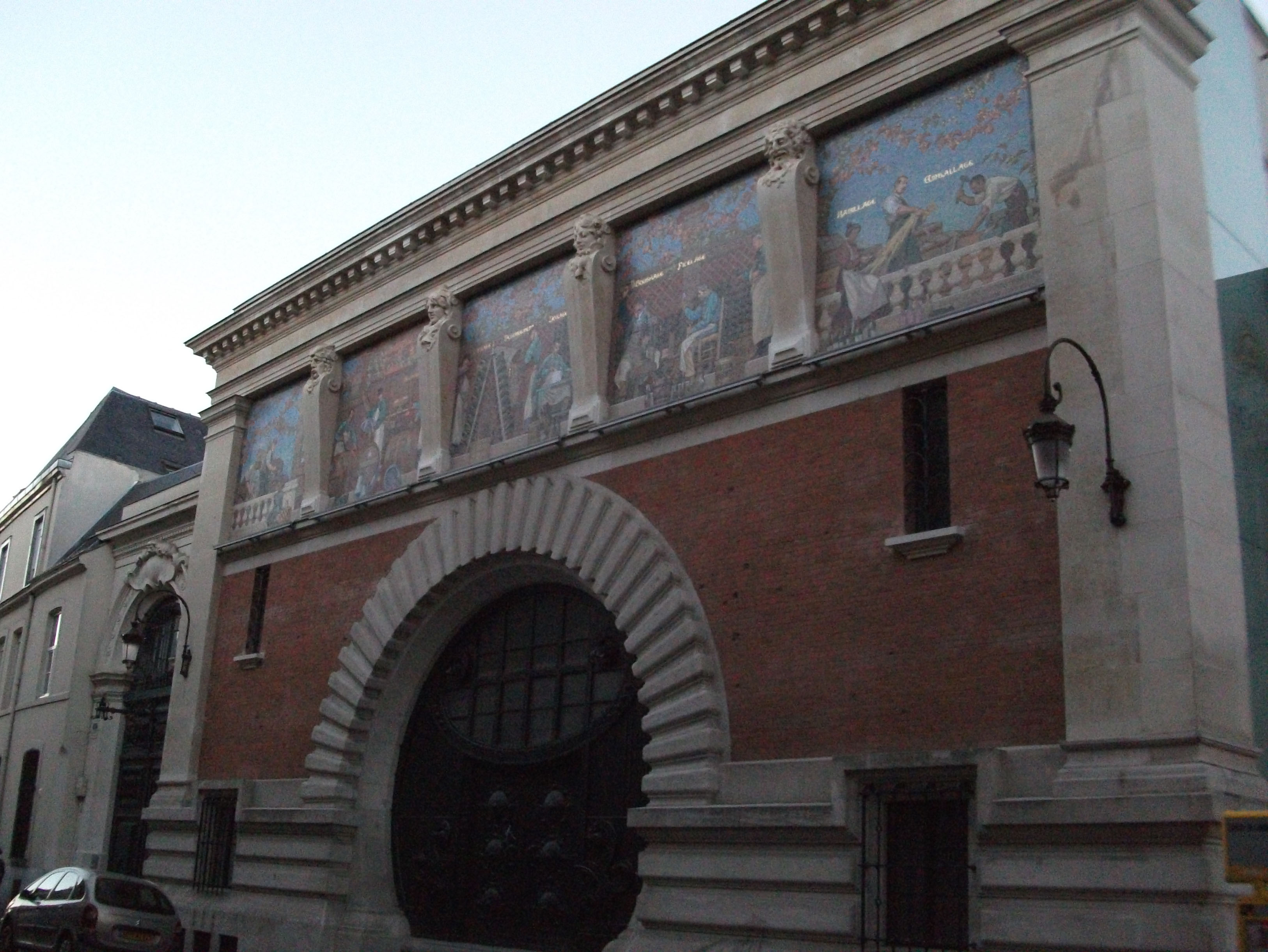 Expéditionskeller (Versand) Champagne G.H. Mumm; die Mosaike stellen die Lese (vendange), das Schönen (collage) und Verschnitt, das Abfüllen (Tirage), das Rütteln (Remuage) und degorgieren (Enthefen), verkorken (bouchage) und sichern (ficelage) und versandfertig machen (habillage et emballage), dar. Architekt: Ernest Kalas, Entwürfe: Joseph Blanc et Guillonet Octave , Bildhauer: Emile Peynot.